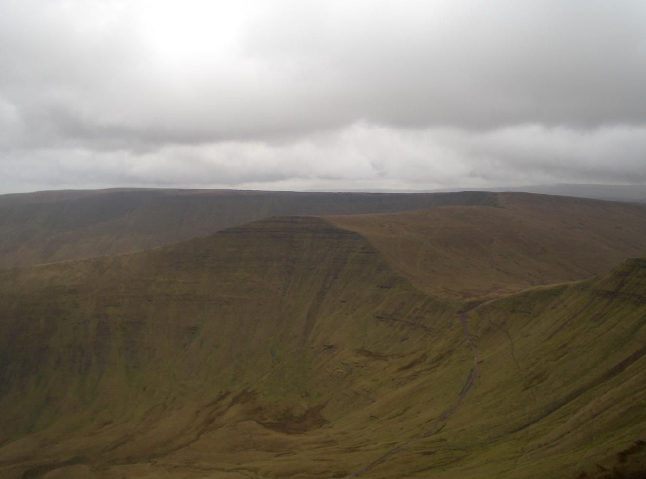 fan y big